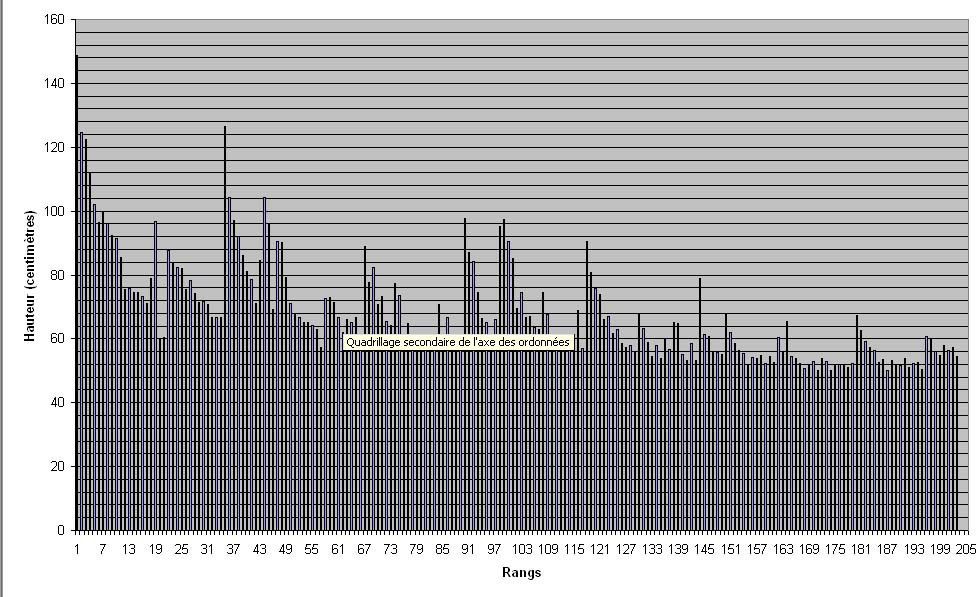 Représentation graphique de l'évolution de la hauteur des rangs d'assises de la pyramide de Khéops d'après les mesures effectuées par Petrie au coin nord-est